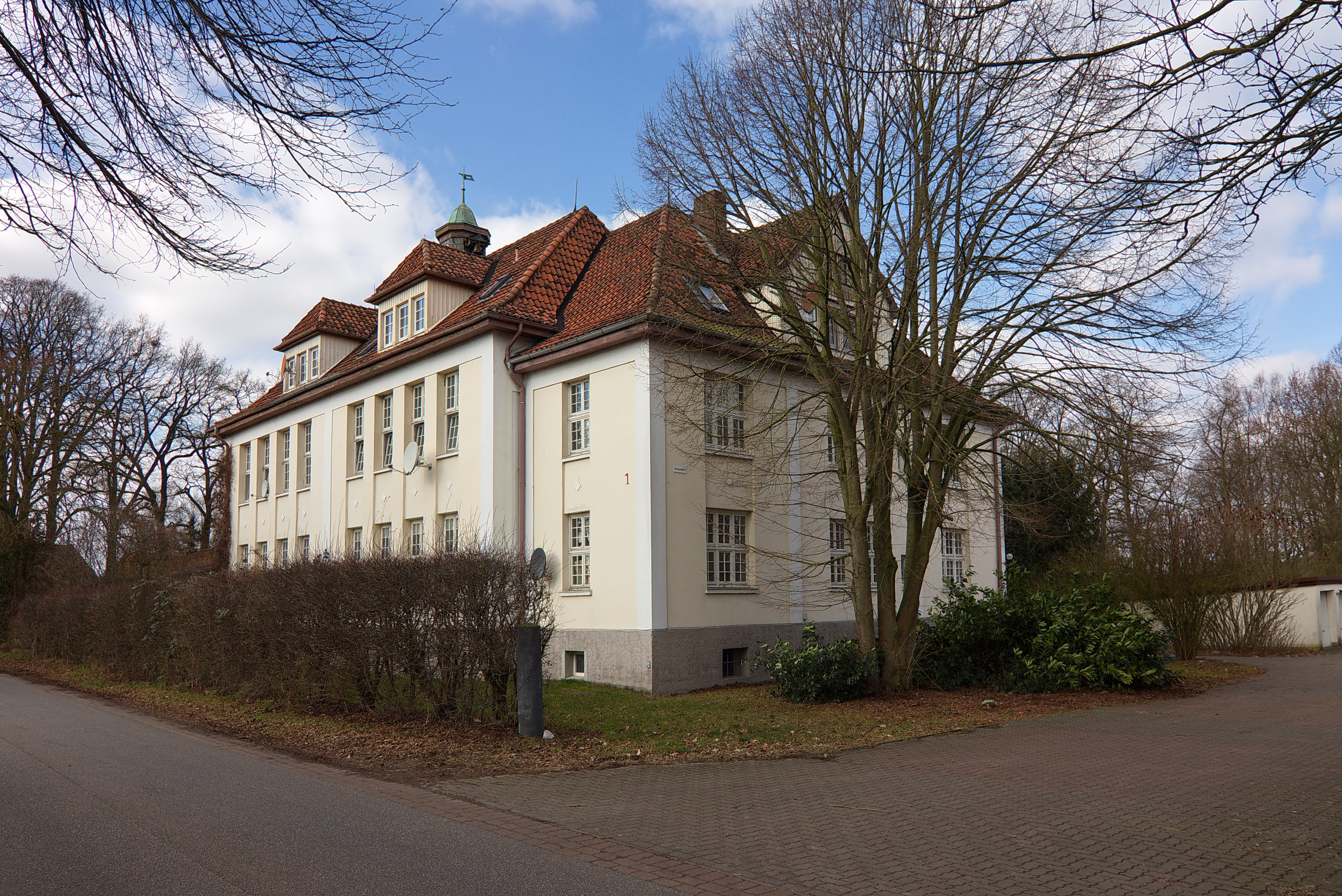 Alte Schule in der Schulstraße 1 in Häuslingen, Niedersachsen, Deutschland